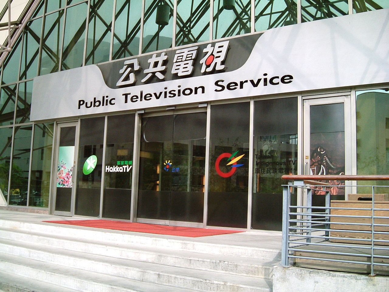 公共電視文化事業基金會B棟大樓大門，中央貼公共電視文化事業基金會標誌，左邊貼客家電視台標誌，右邊貼原住民族電視台標誌。